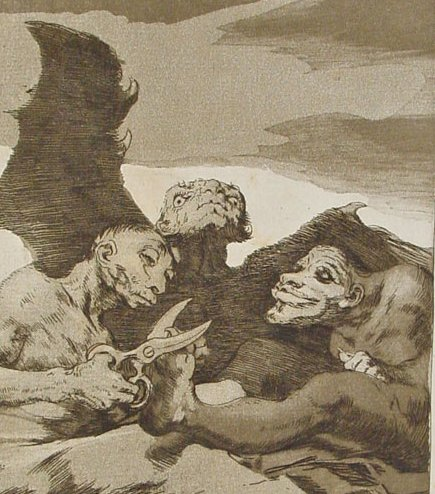 Se repulen.-Detalle 1 del Capricho nº 51: Francisco Goya y Lucientes, Pintor de Goya, serie Los Caprichos